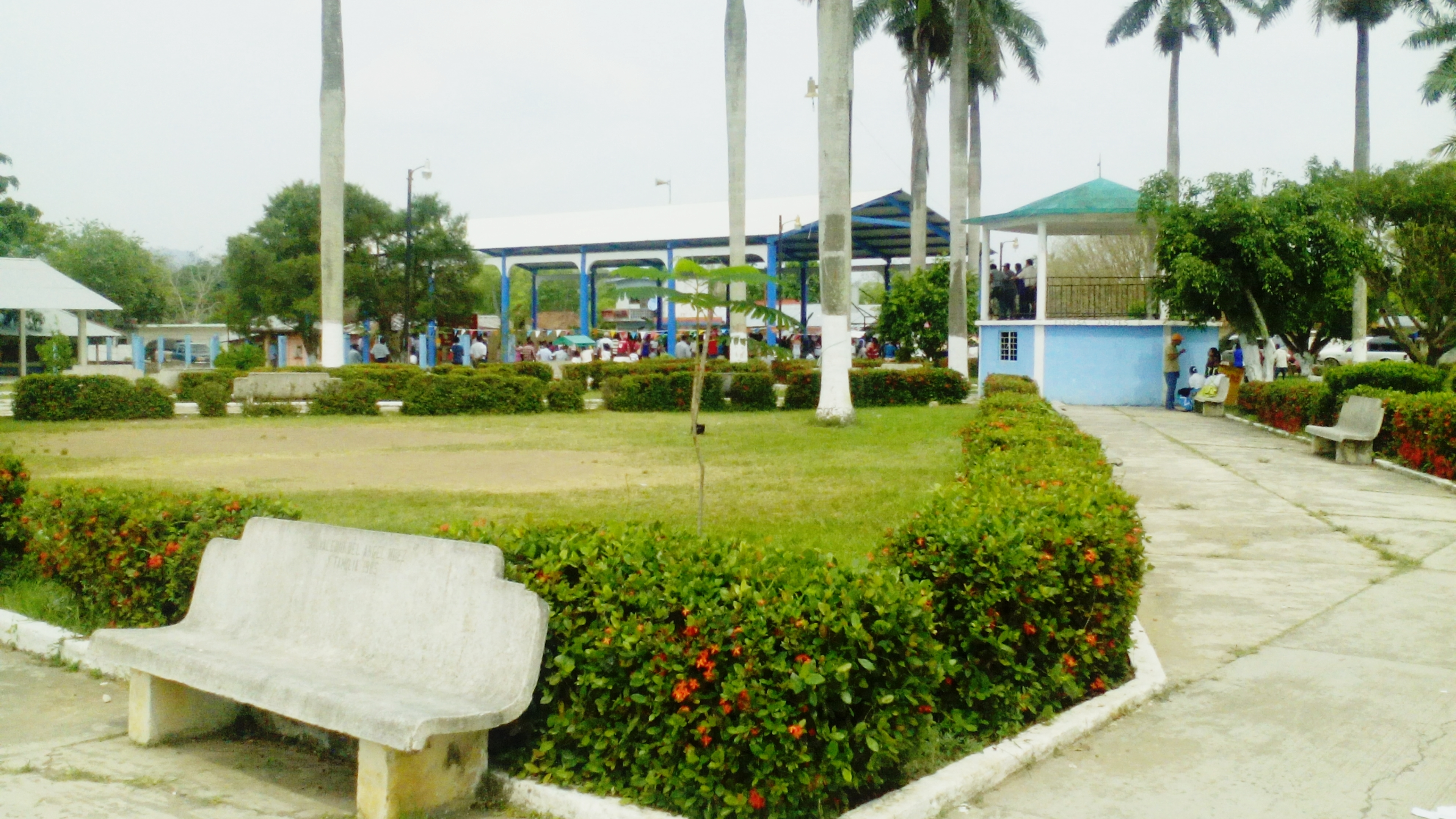 centro ixcanelco